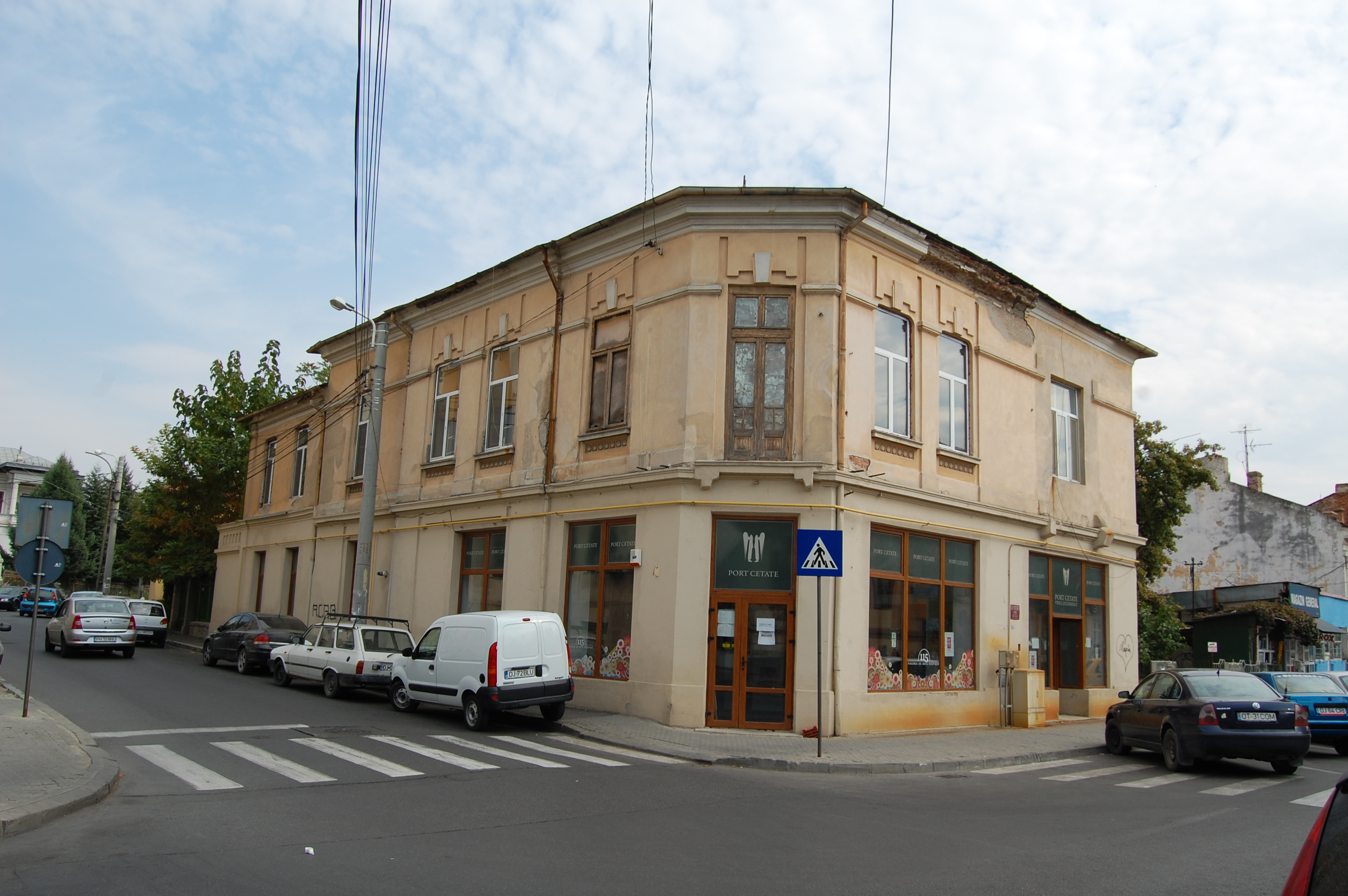 Azi, "Port Cetate"